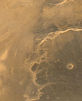 Stromtal Kasei Valles auf dem Planeten Mars